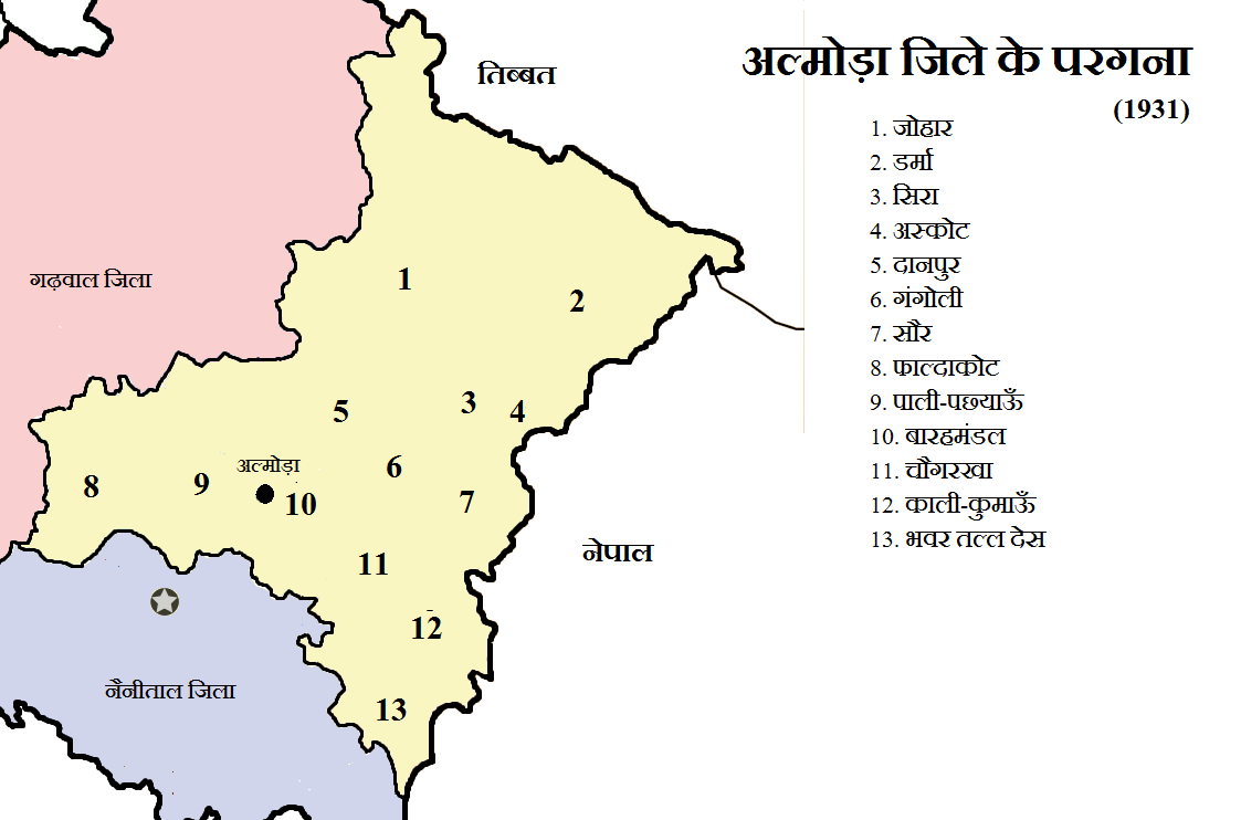 अल्मोड़ा जिले के परगना (१९३१)